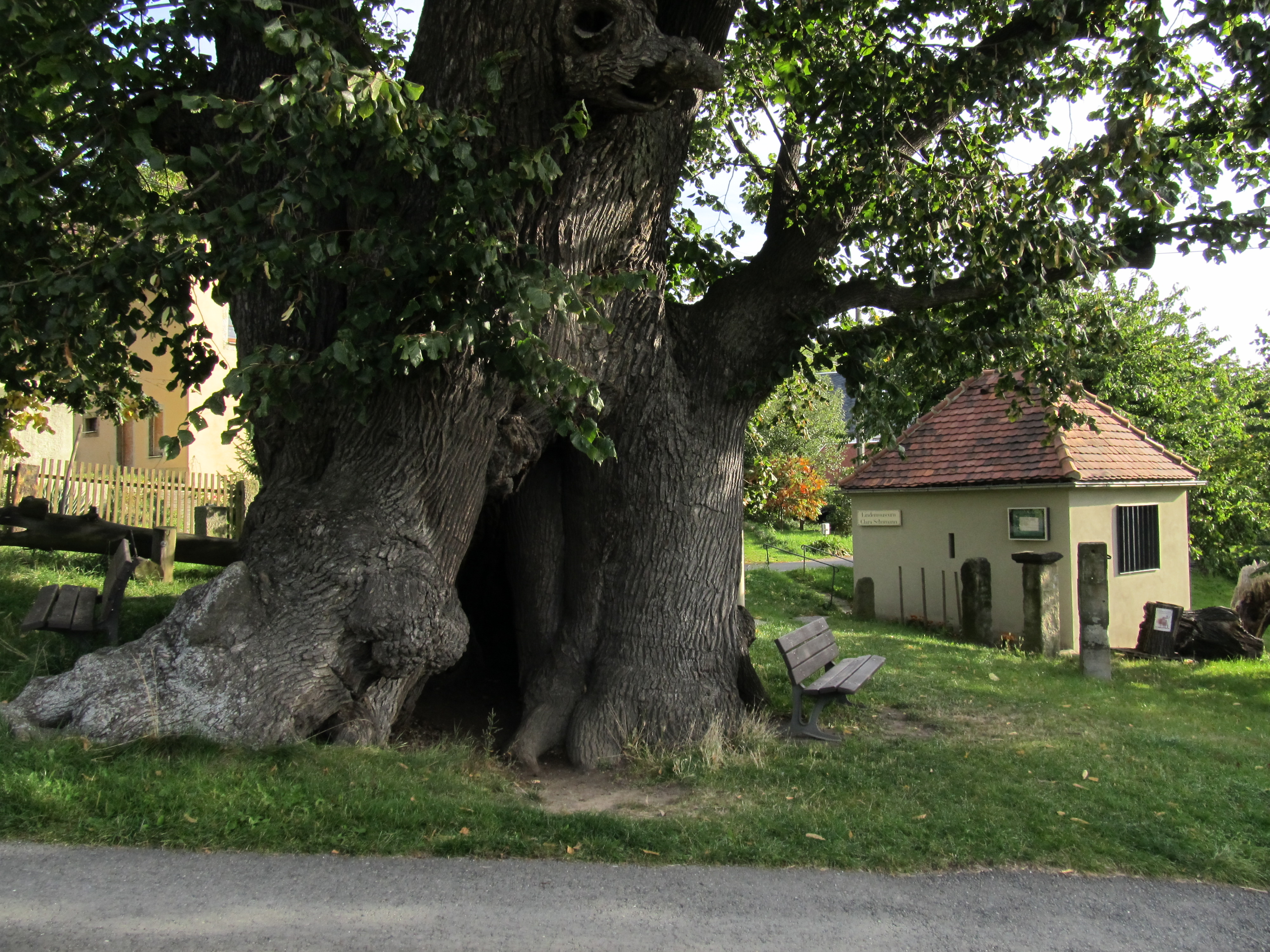 Schmorsdorfer Linde mit Clara-Schumann-Museum